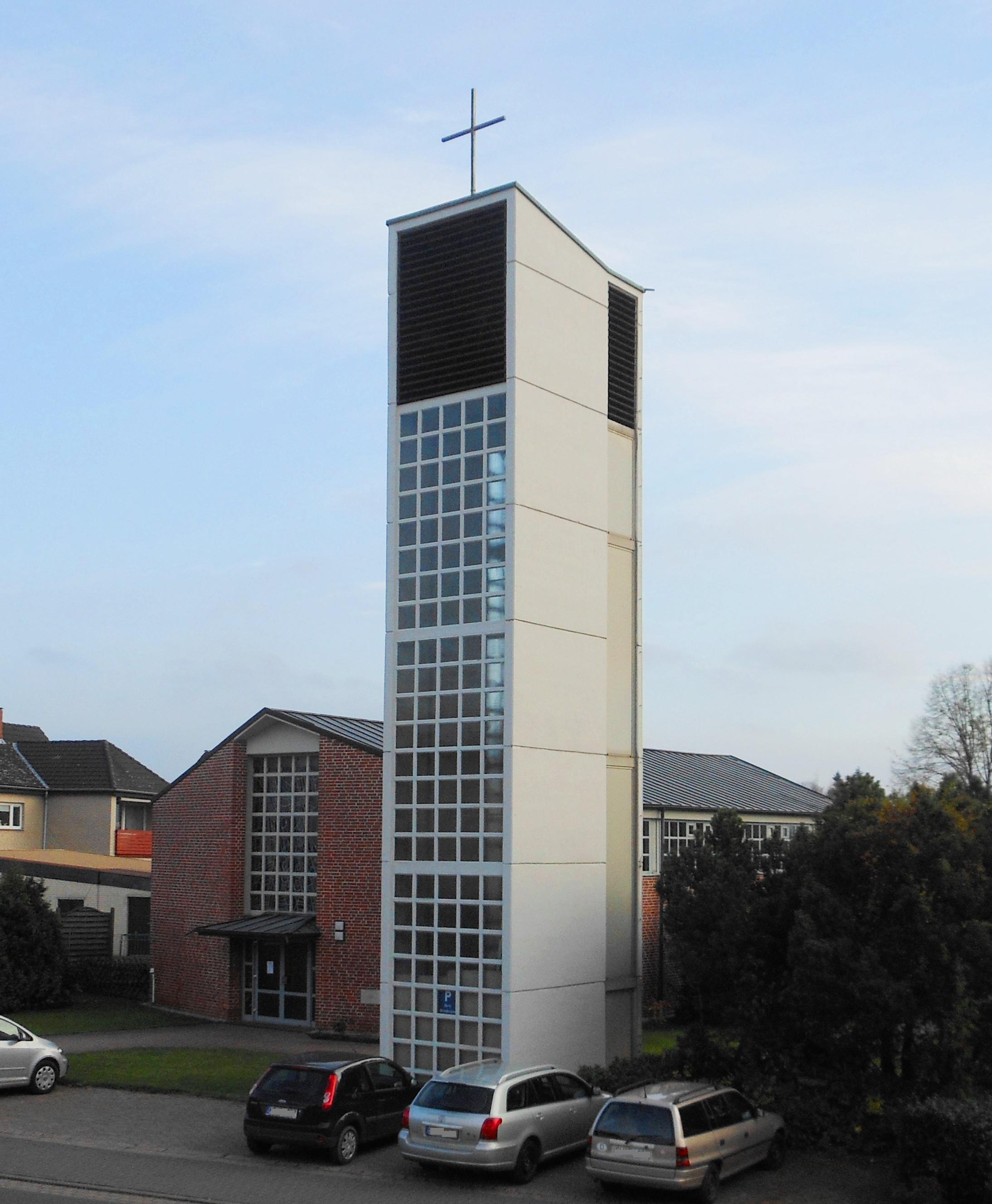 Lauenau, kath. Kirche St. Markus